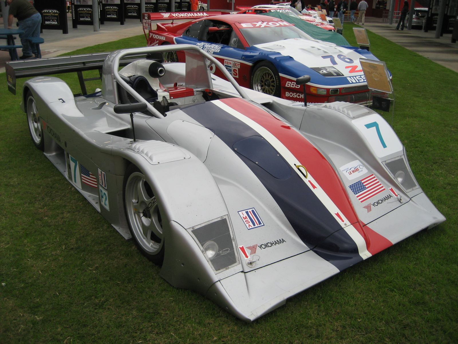 Risi Competizione's Lola B2K/40-Nissan.